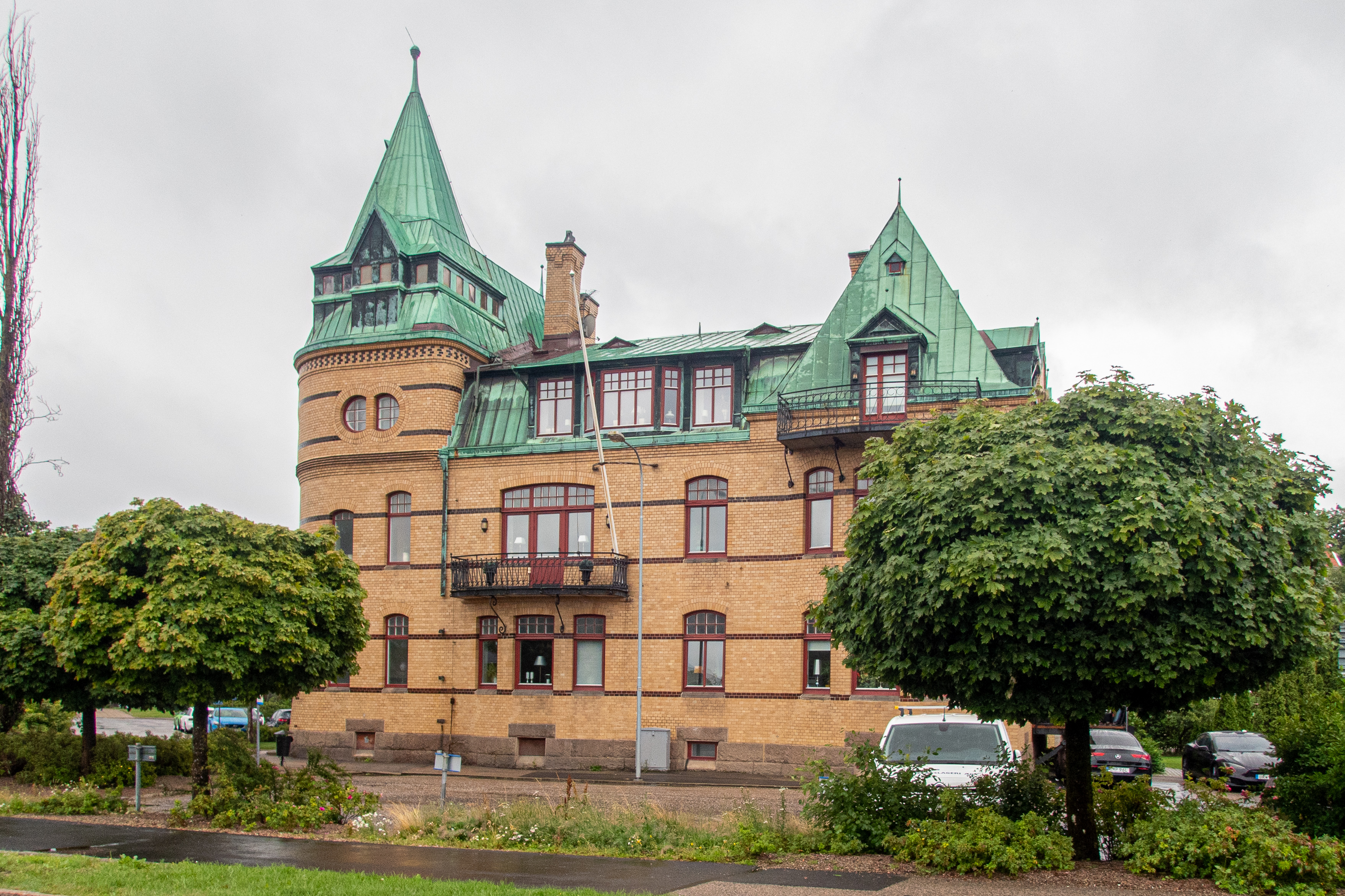 Petersonska huset eller Rybergska huset vid Södra Hamnen 3 Uddevalla byggdes åren 1902 - 1904 av en av Sveriges första oljeimportörer, John Peterson. Men huset fick i första hand sitt namn från familjen Ryberg som ägde det mellan åren 1915 - 1982. Den detaljrika jugendbyggnaden ritades av göteborgsarkitekten Eugen Thorburn.